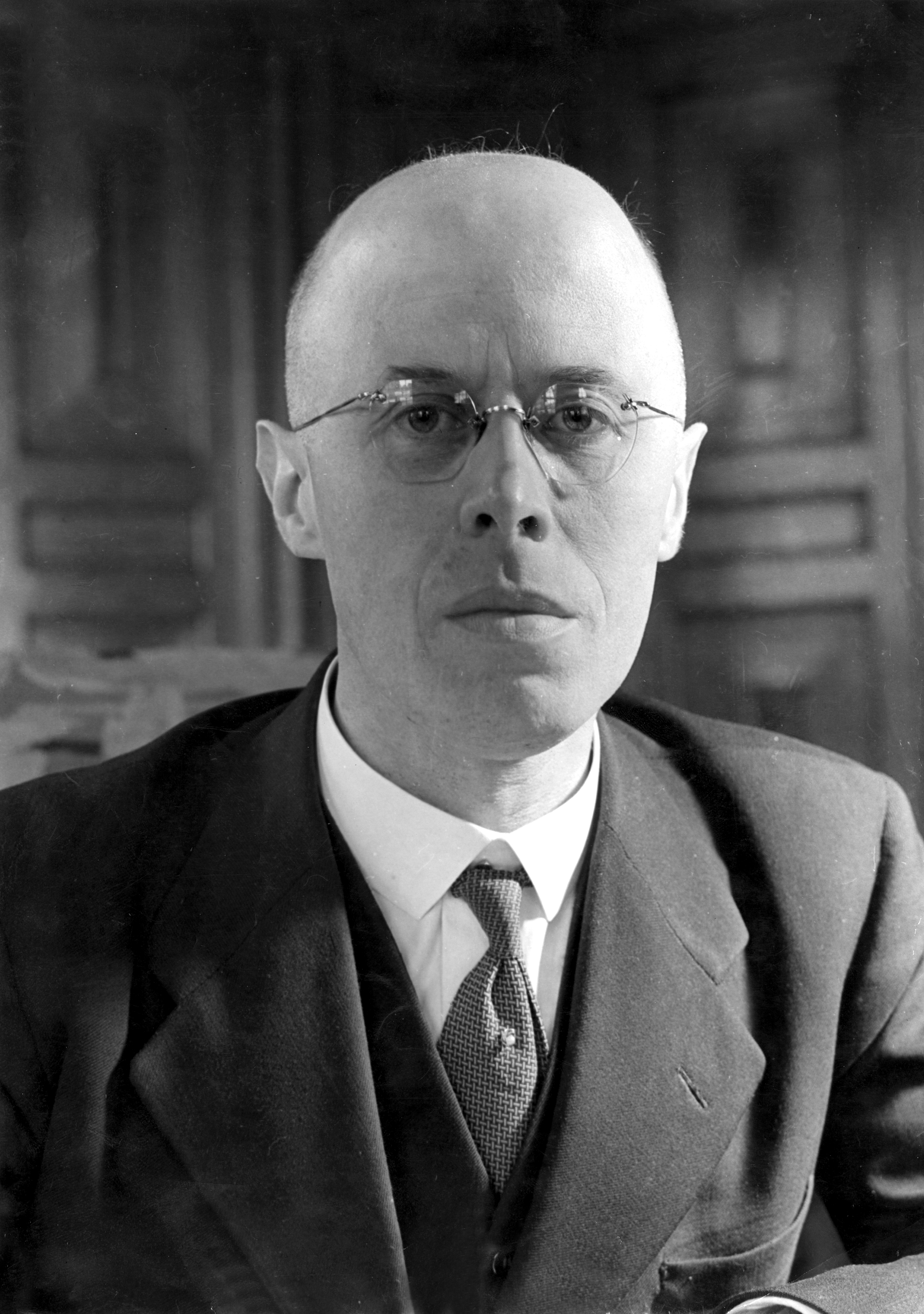 Beel, L.J.M. (RKSP / KVP). Minister-president Beel. Portret. [Nederland, Den Haag], 1947.